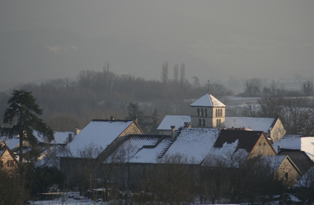 Vue sur le bourg de Ceyzérieu sous la neige.